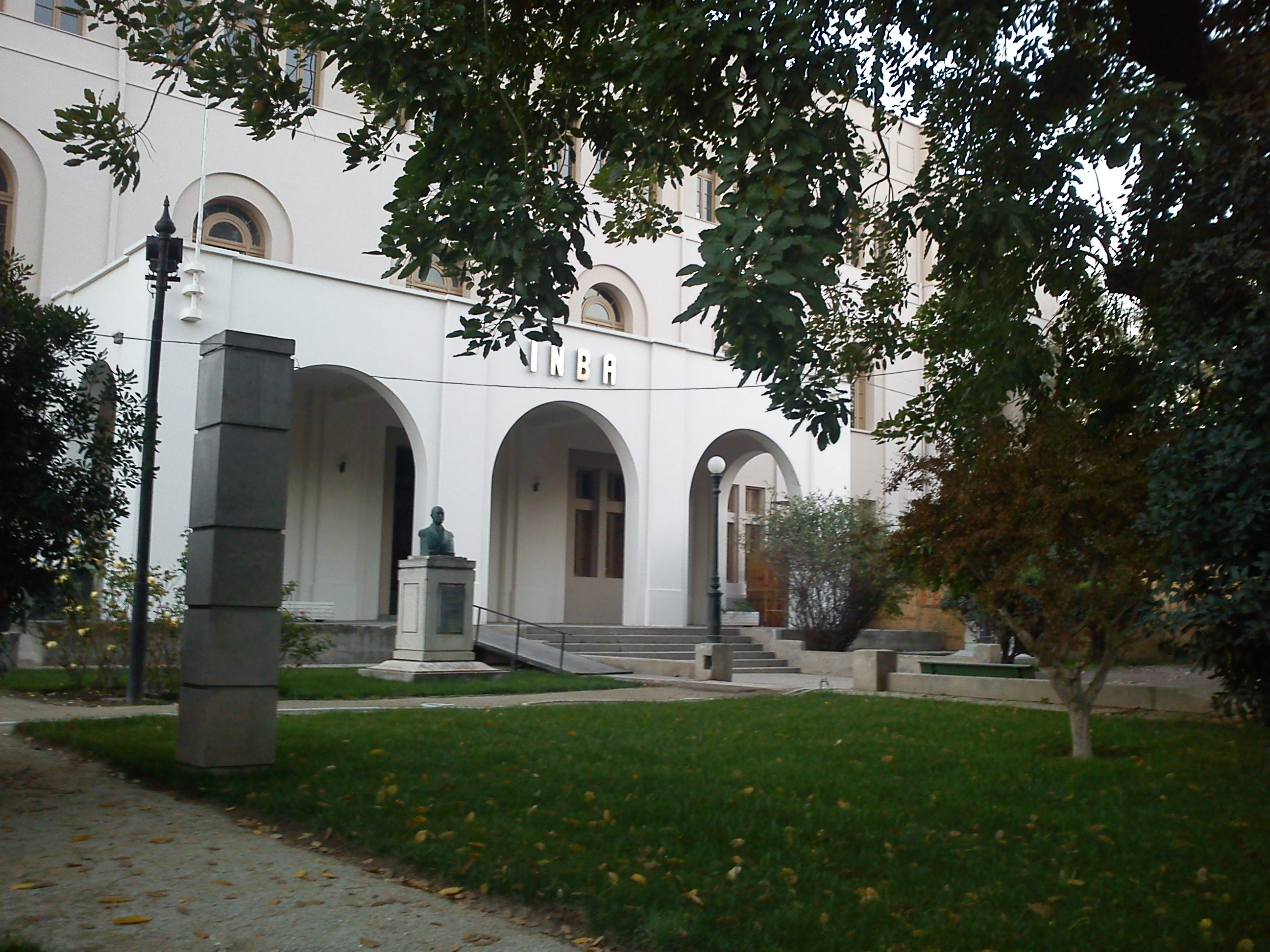 Fotografía del frontis del Internado Nacional Barros Arana luego de su remodelación posterior al terremoto 27-f, Santiago de Chile.